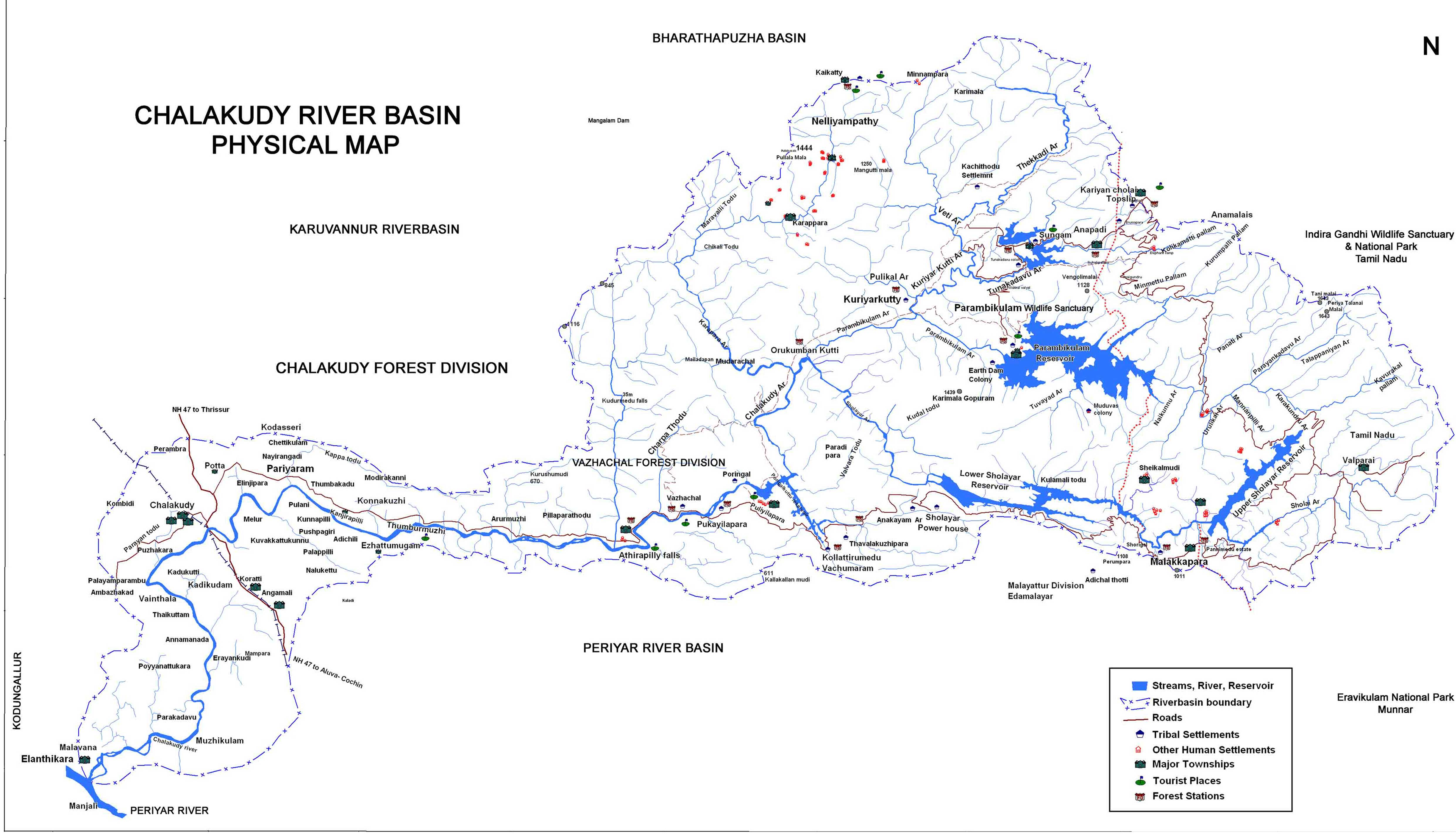 Chalakudy River Basin Map